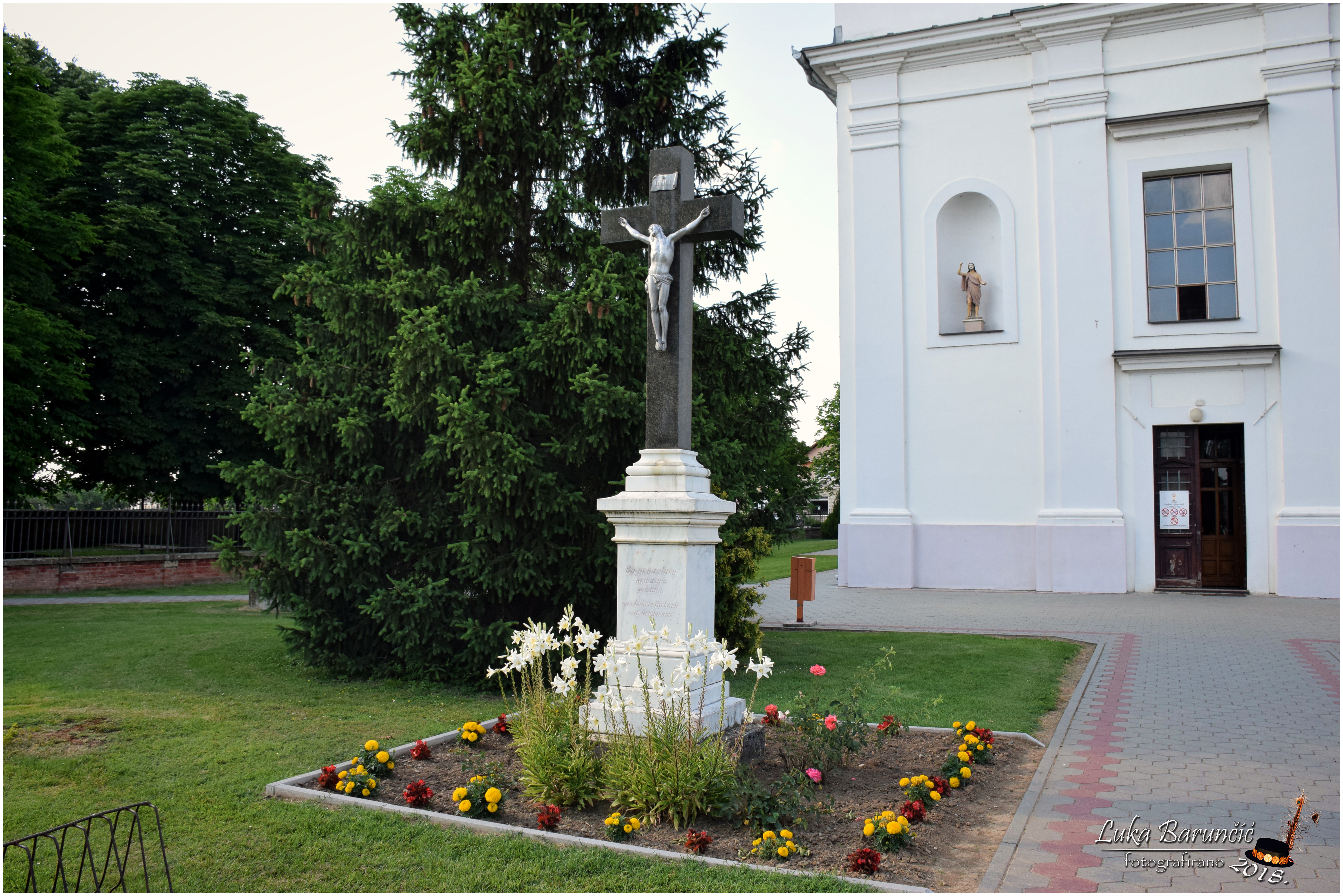 Crkva sv. Lovre Đakona i Mučenika